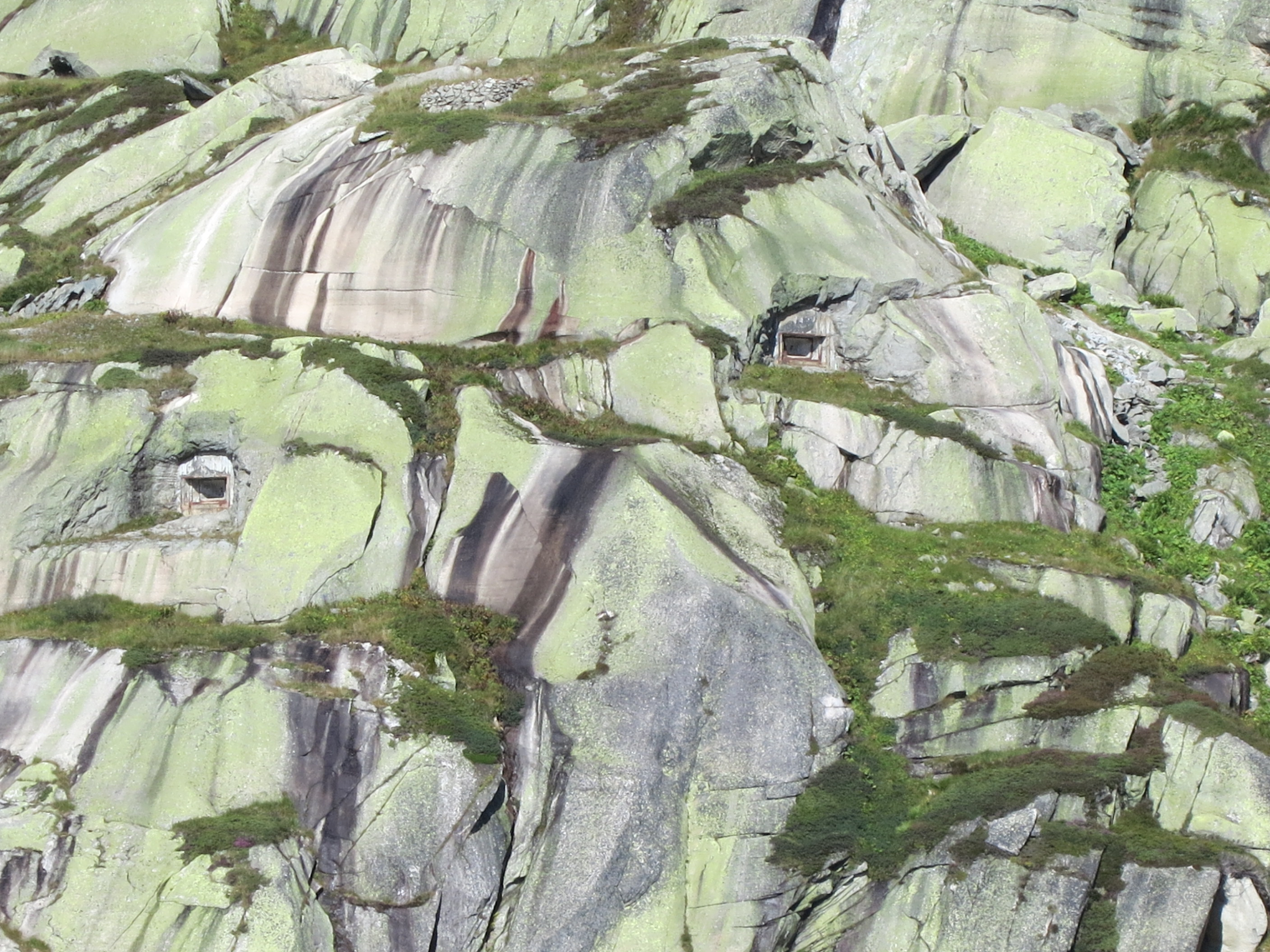 Artilleriewerk Grimsel, Guttannen BE, Schweiz